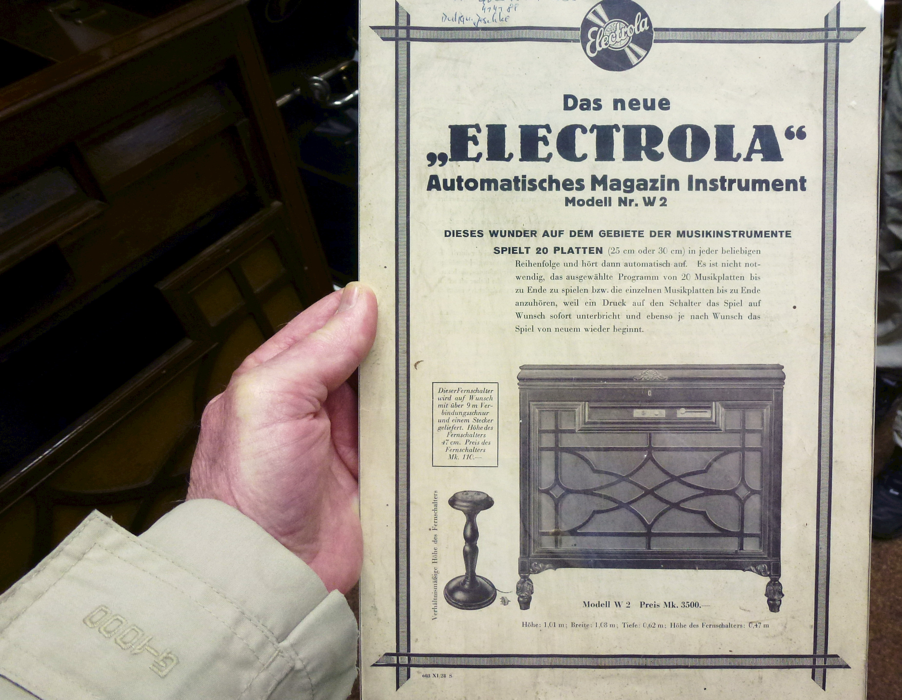 Phonomuseum "Alte Schule" in Holzdorf